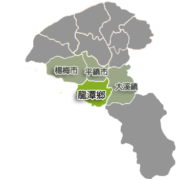 桃園縣龍潭鄉行政區劃。